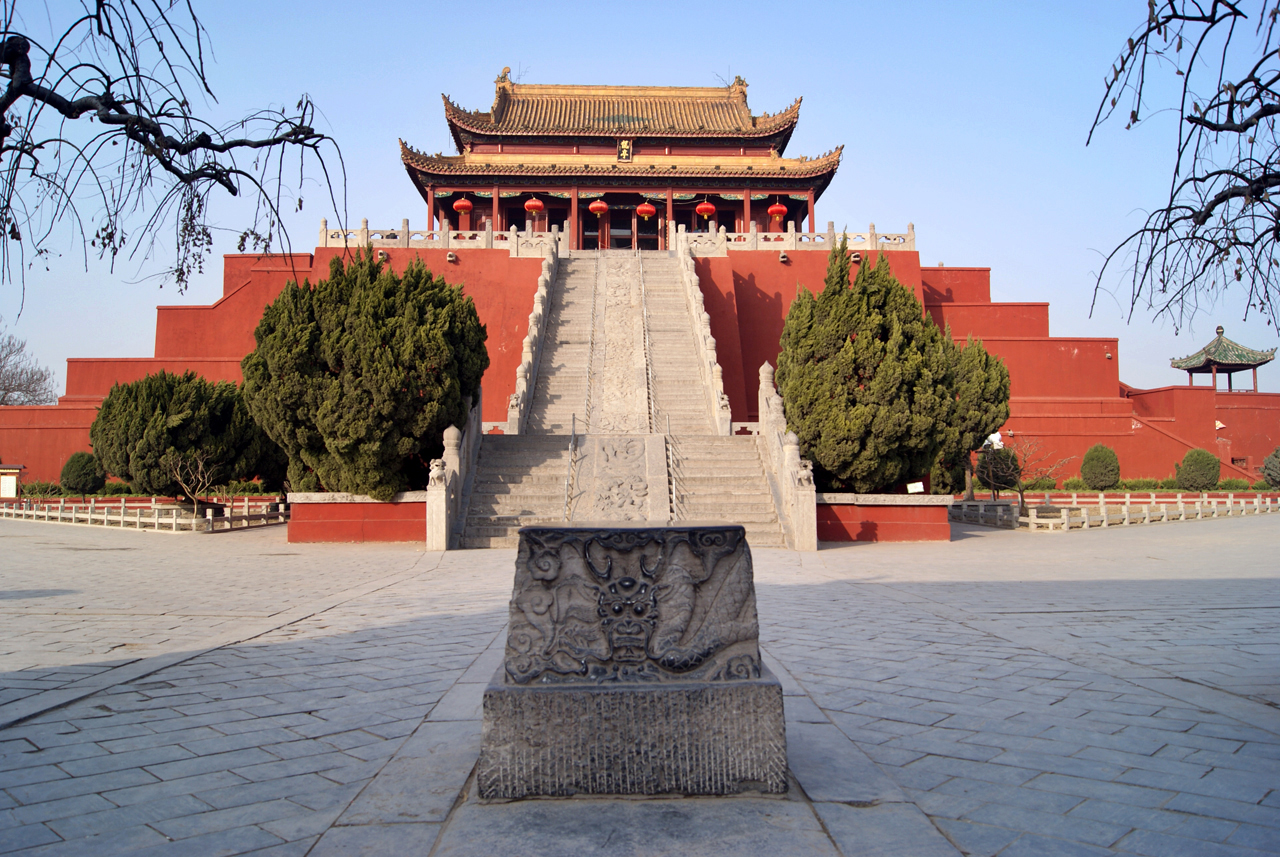 龙亭公园